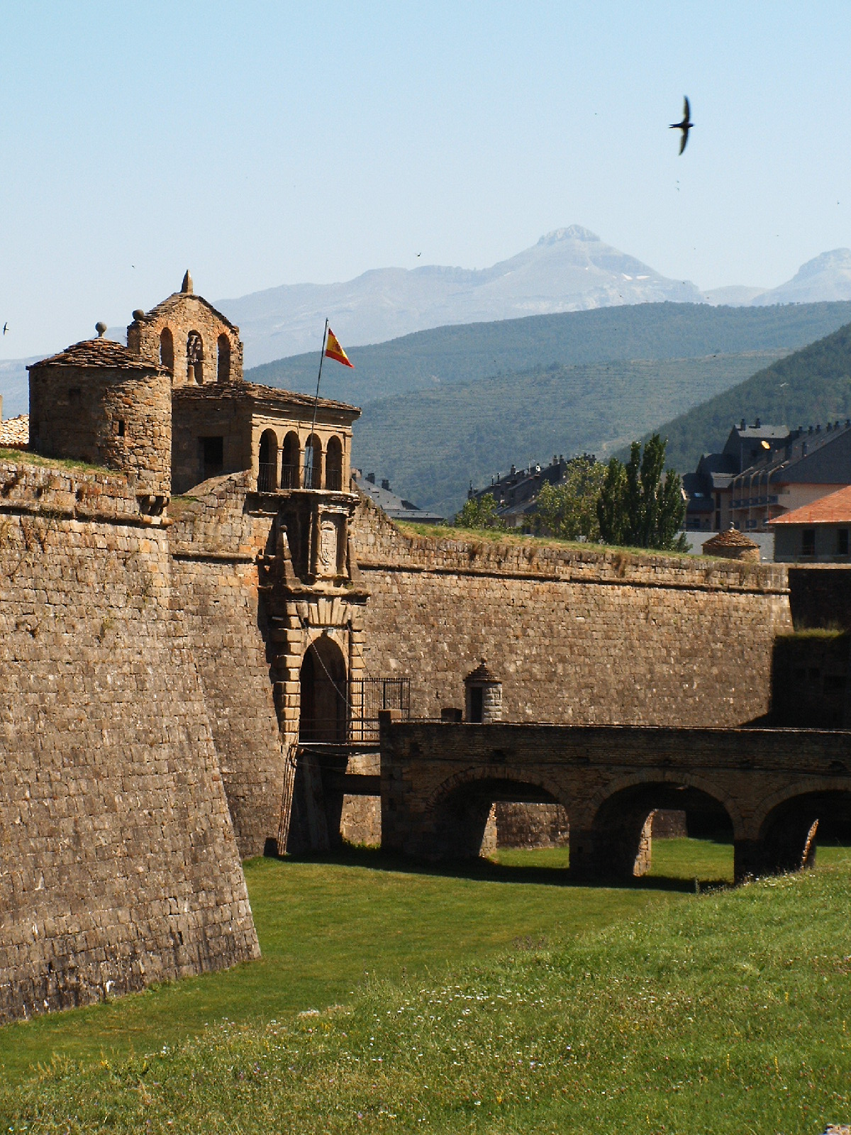 Acceso a la fortaleza de Jaca sobre el foso (Huesca, España).